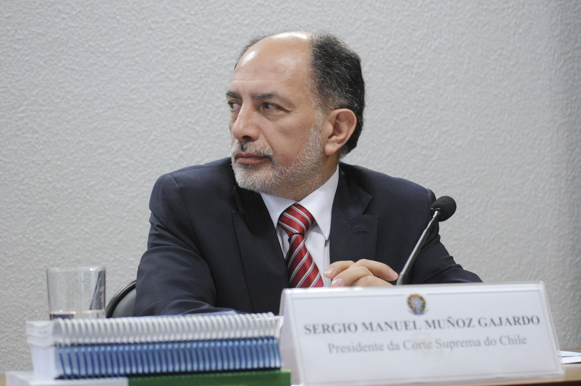 COLÓQUIO INTERNACIONAL JUÍZES E MEIO AMBIENTE Sala de comissões do Senado Federal durante audiência pública da CCJ para debater o papel dos Juízes na proteção do meio ambiente. Em pronunciamento, presidente da Corte Suprema do Chile, Sergio Manuel Muñoz Gajardo. Foto: Geraldo Magela/Agência Senado